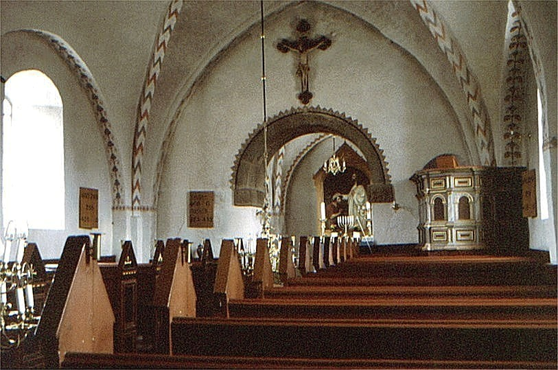 Svostrup Kirke, kirkerummet